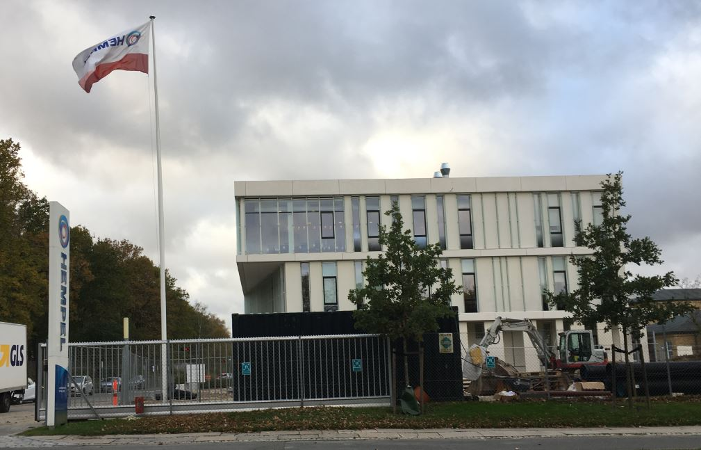 Hempels hovedkvarter på Lundtoftegårdsvej. Grundlagt i 1915.